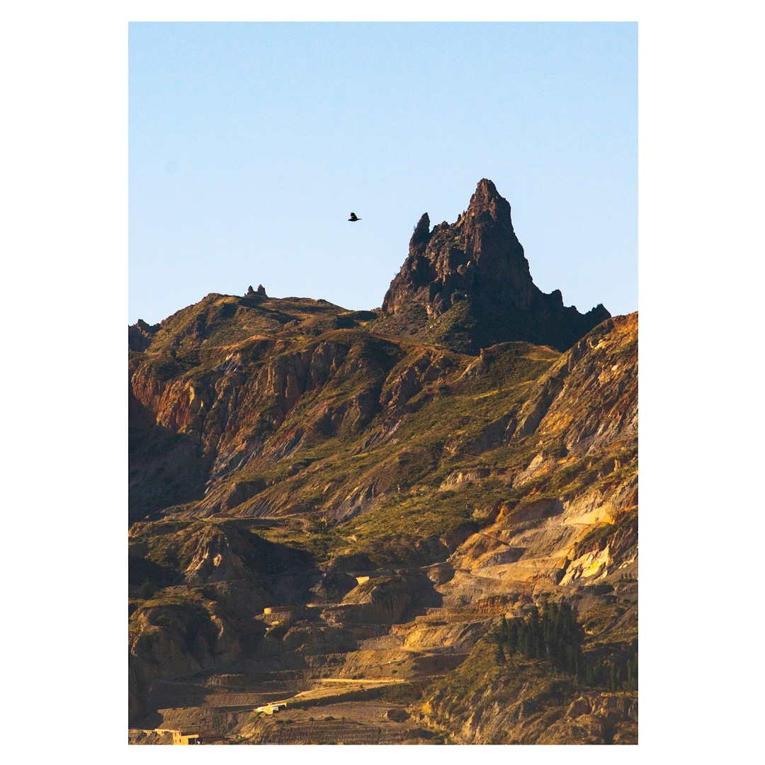 Vista desde la zona de Obrajes